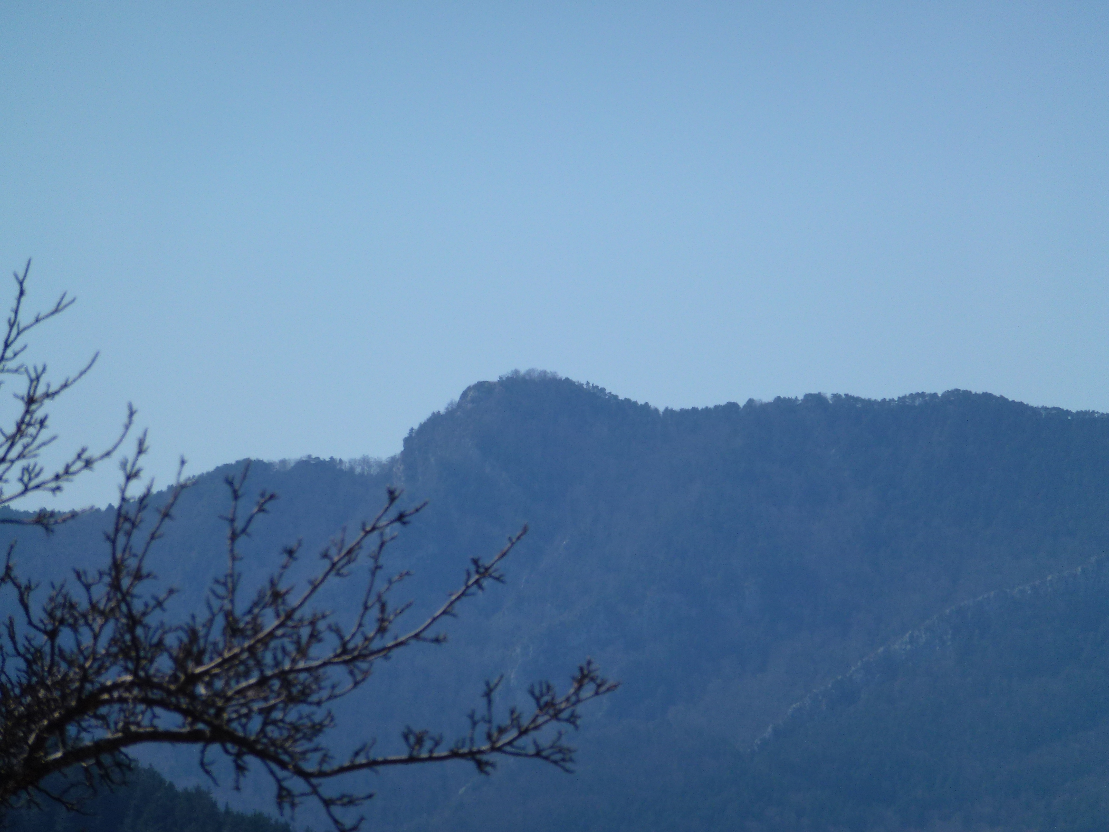 La Berruga (Campelles) (1787,2 msnm)